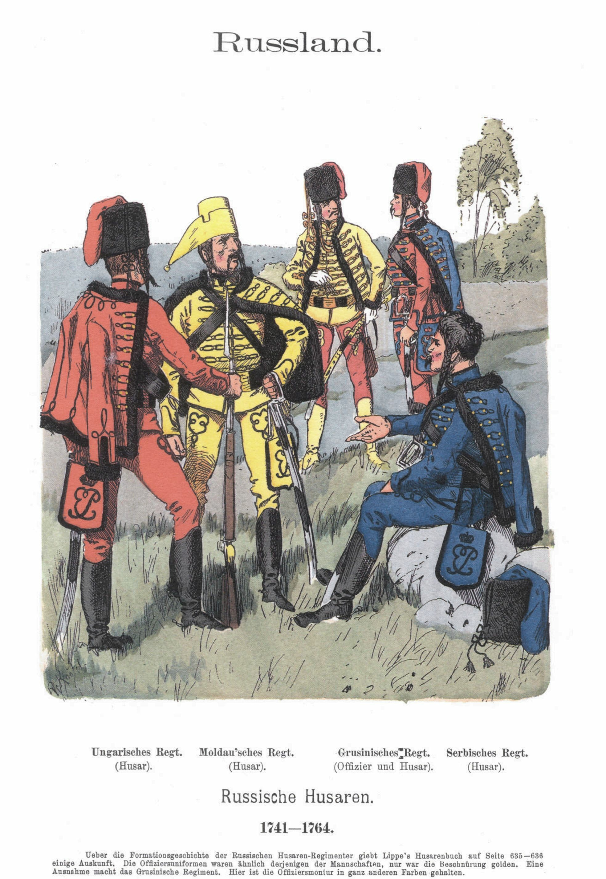 Иллюстрация Рихарда Кнотеля